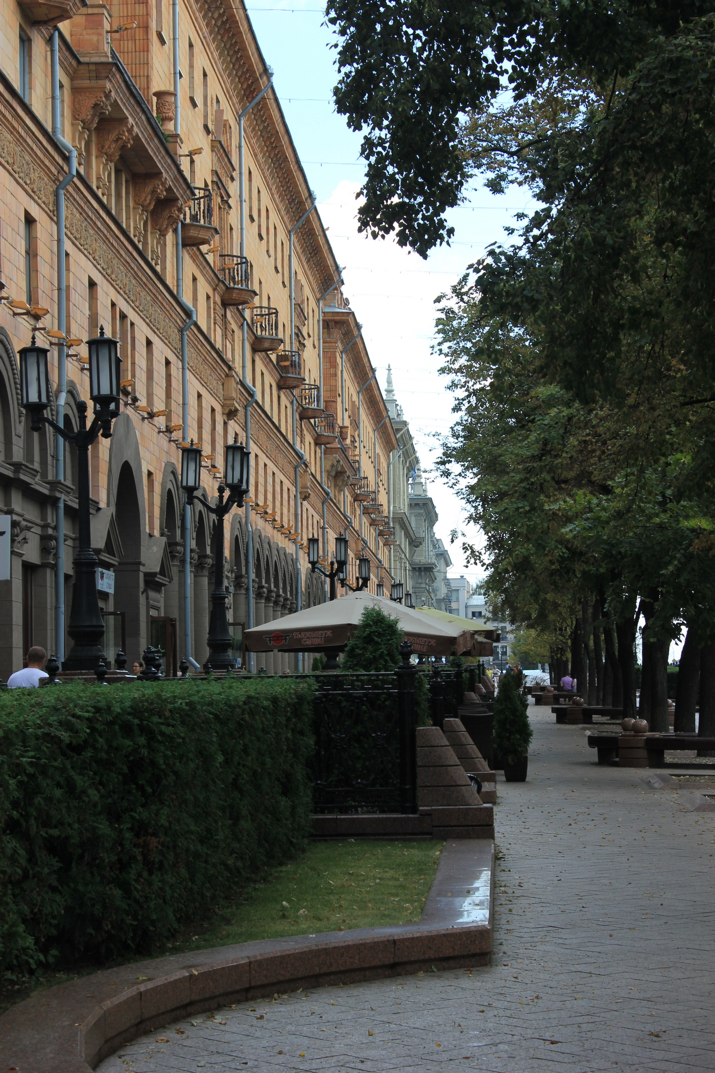 Minsk; Leninstraße.